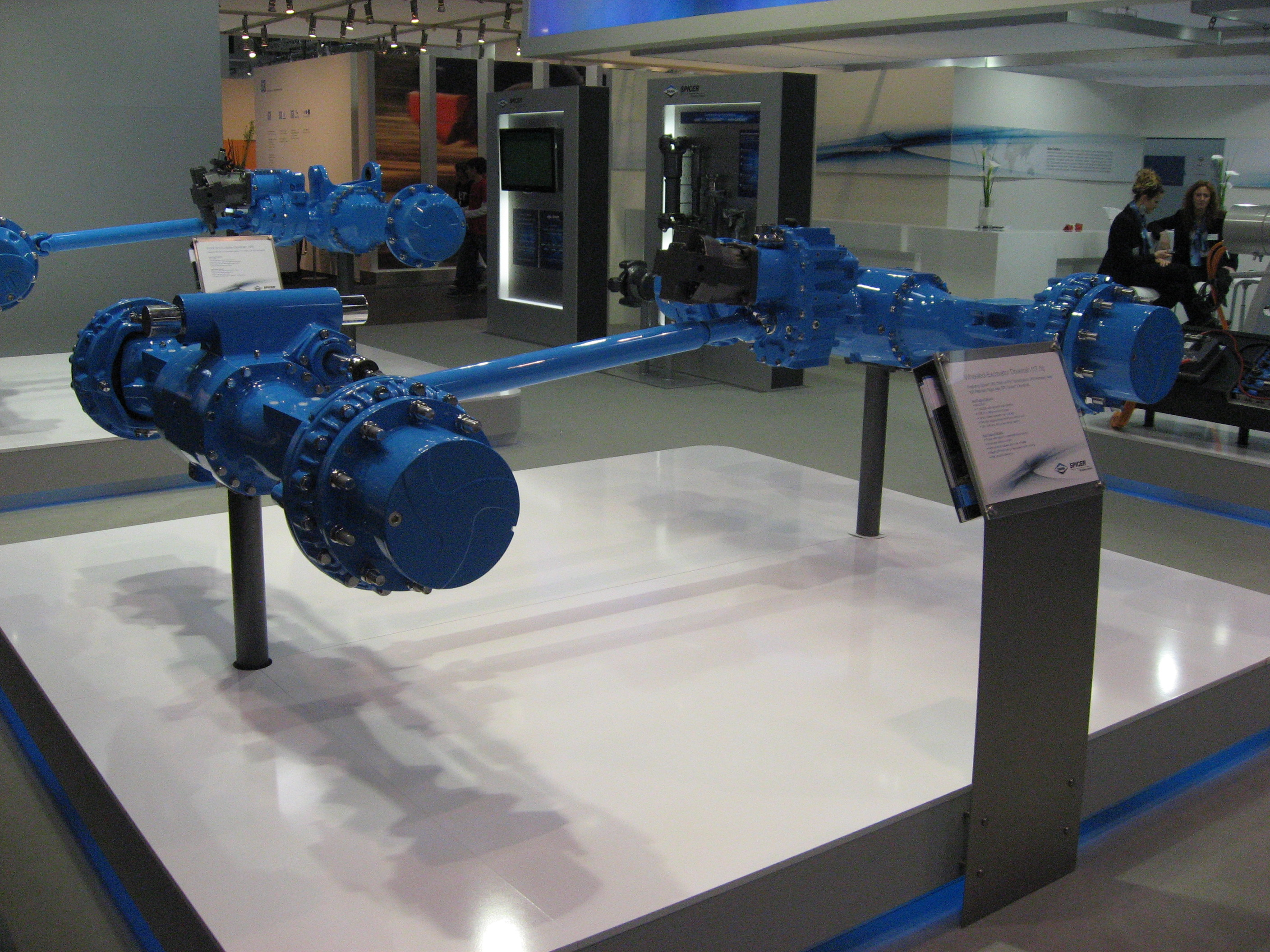 Antriebsstrang einer Baumaschine aufgenommen auf bauma 2010 in München